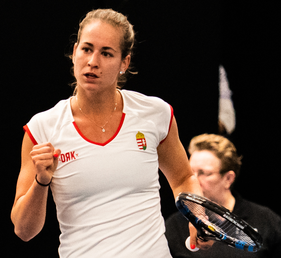 Bondár Anna